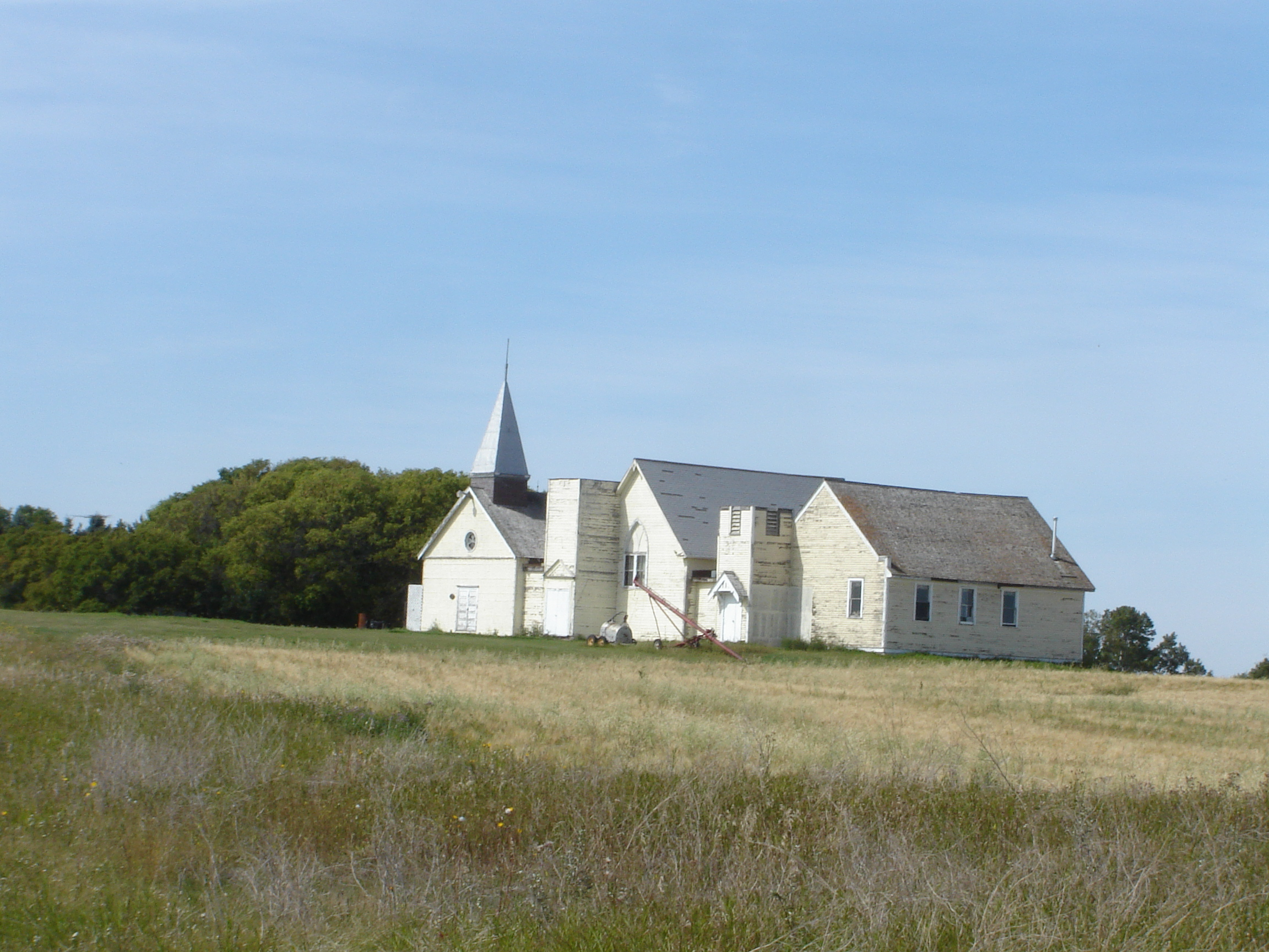 Buildings along Sk Hwy 35 Between Fort Qu'Appelle and Qu'Appelle Saskatchewan